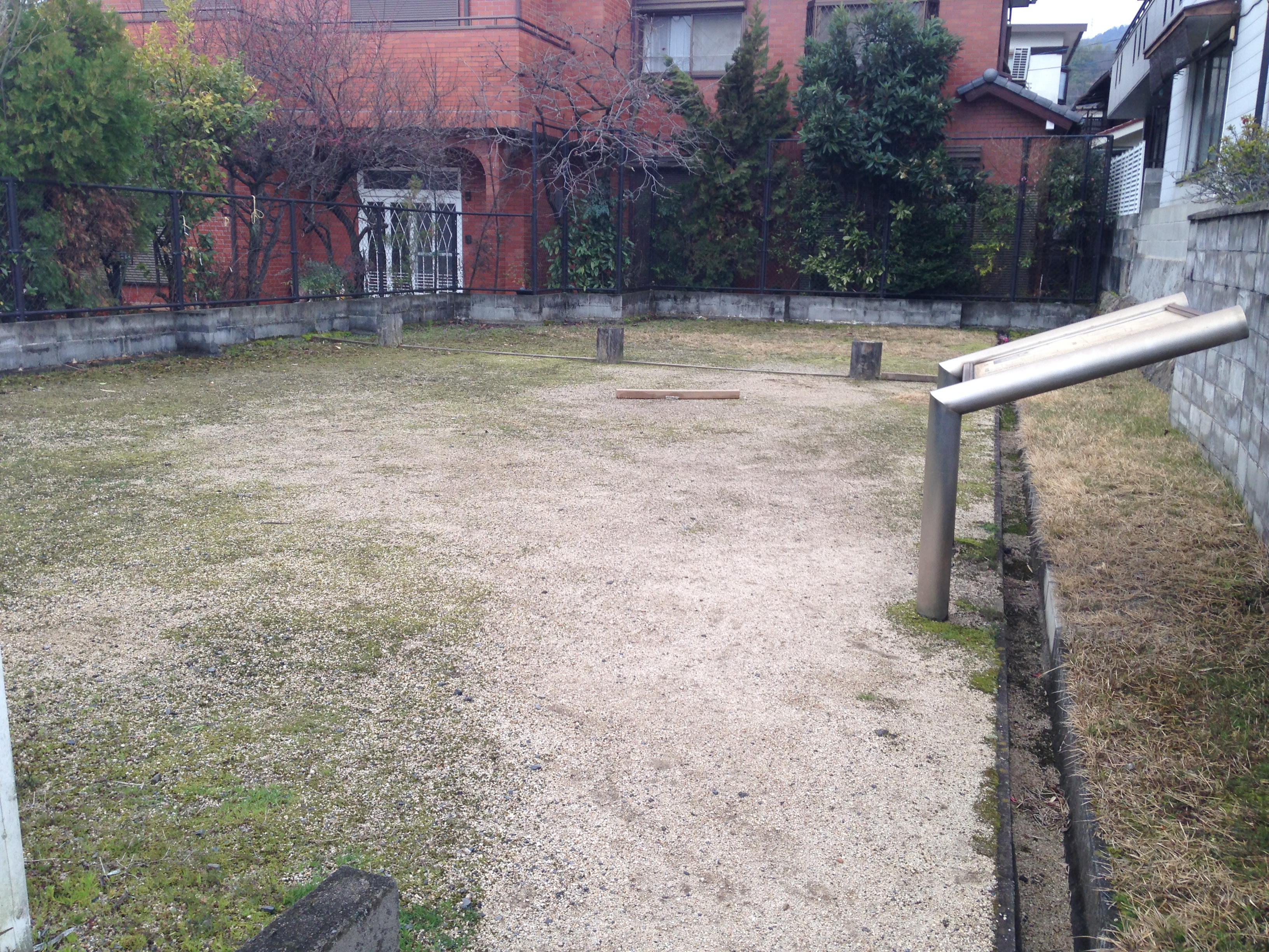 滋賀県大津市錦織にある近江大津宮錦織遺跡